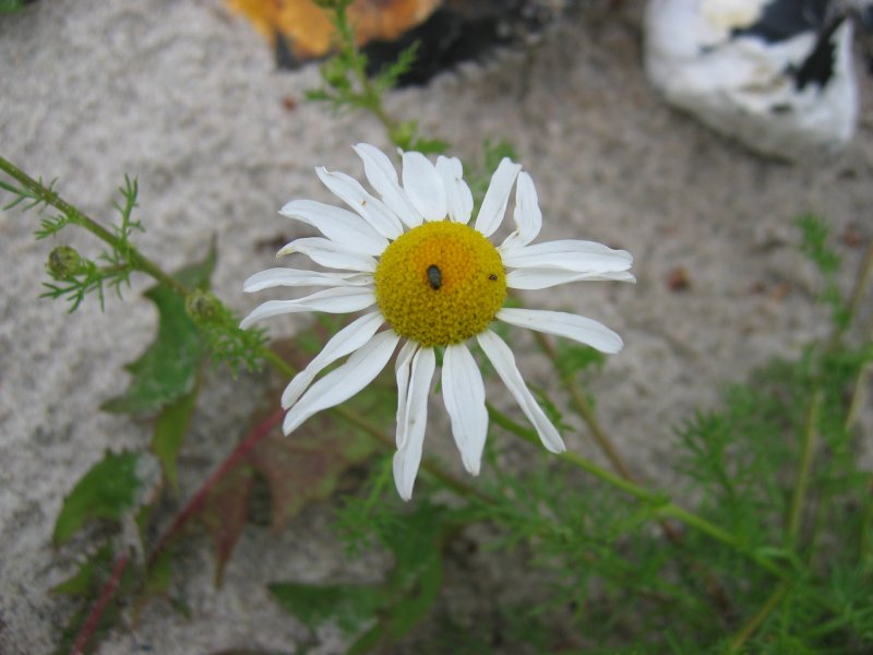 Echte Strandkamille Tripleurospermum maritimum, Blüte